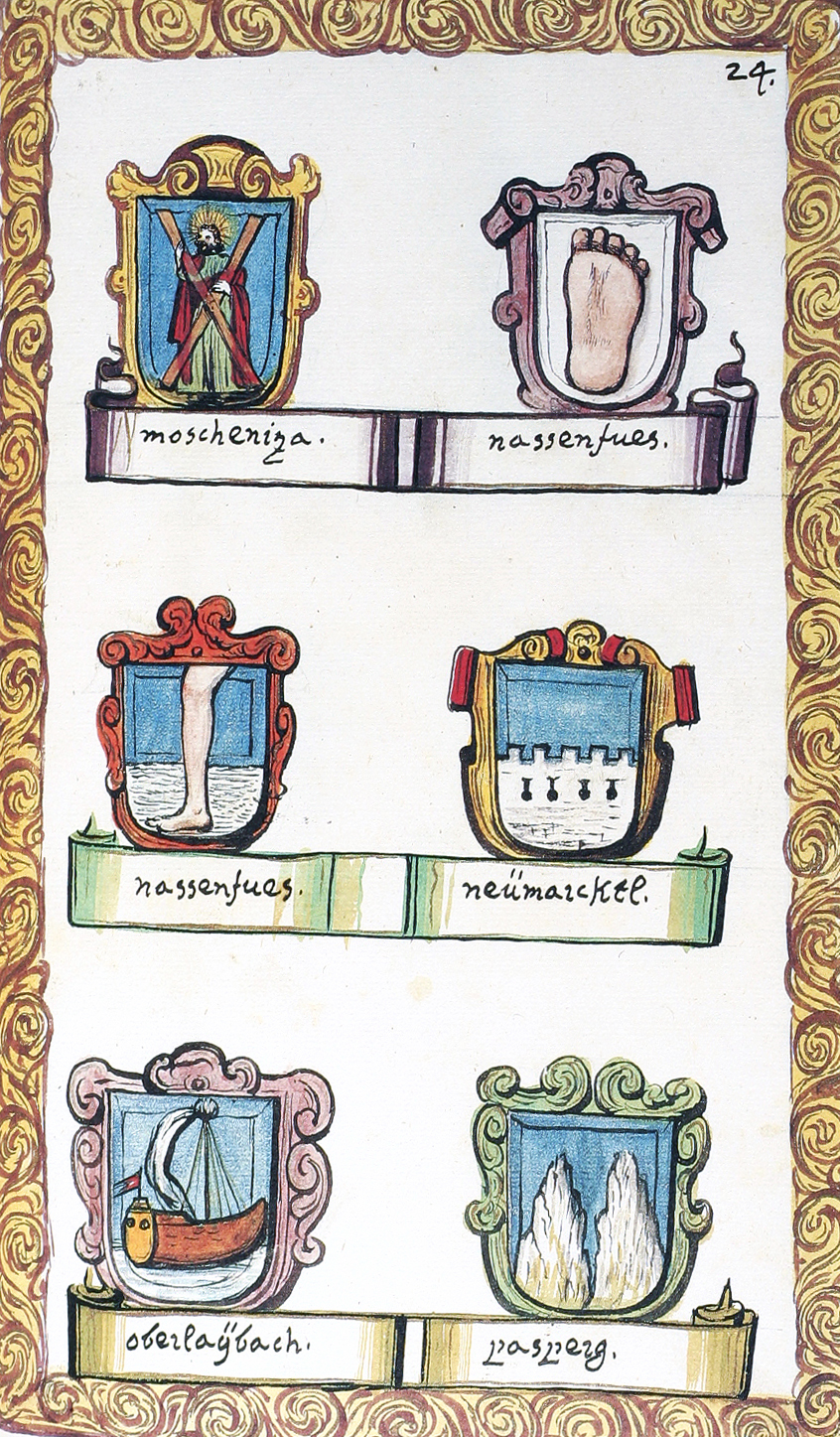 Valvasor Grbovna knjiga Mokronog